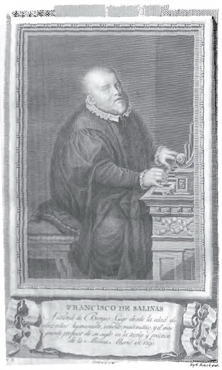 Retrato de Francisco de Salinas.